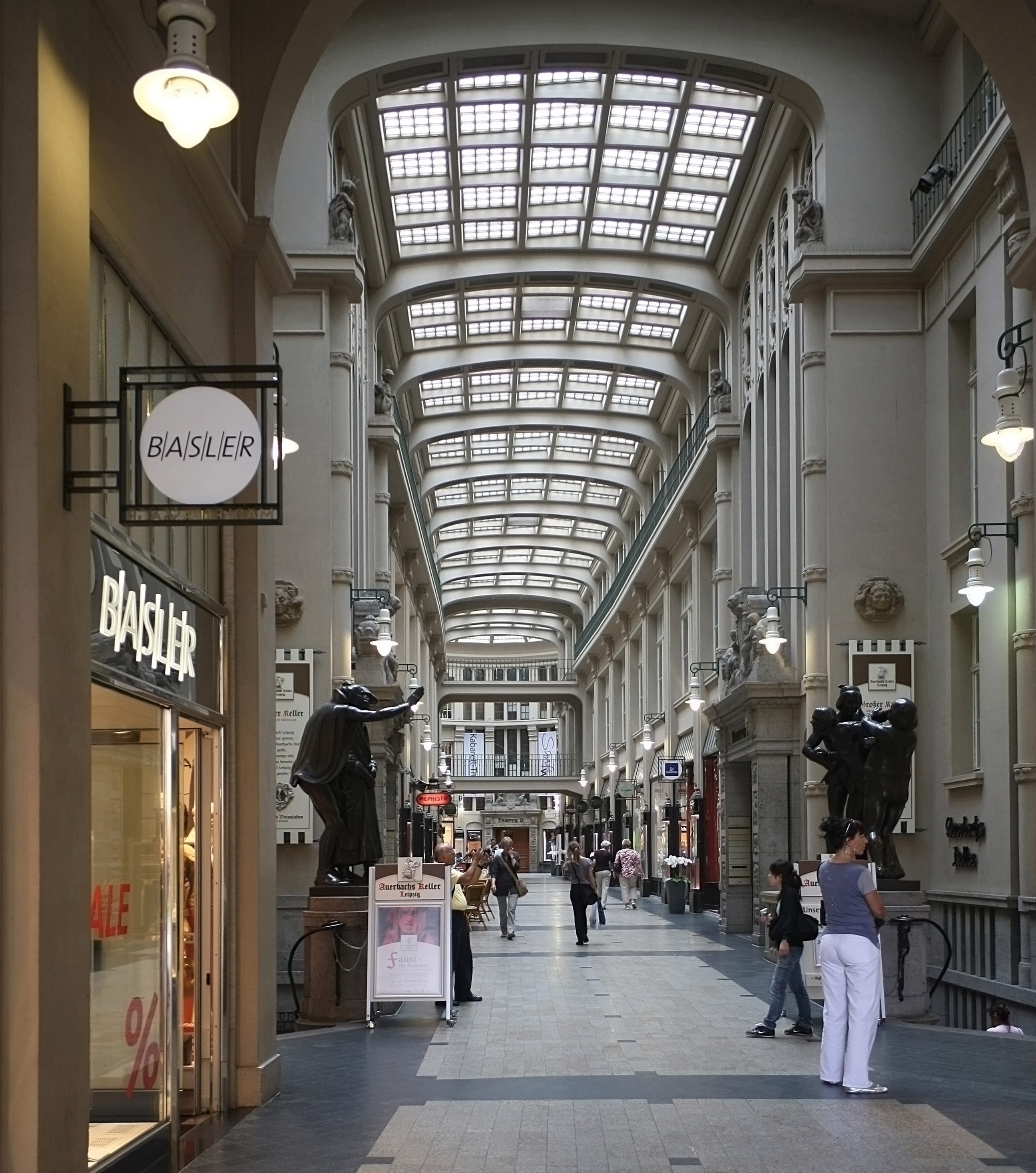 Mädlerpassage mit Auerbachs Keller in Leipzig